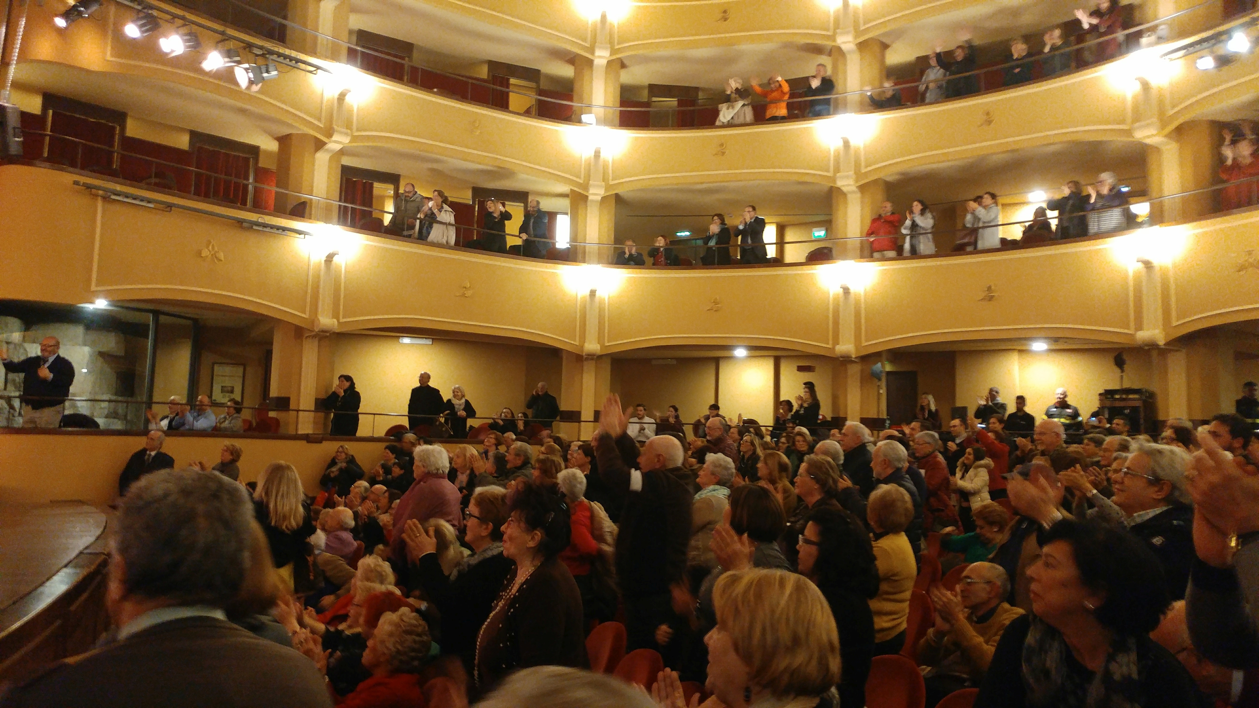 il pubblico del teatro